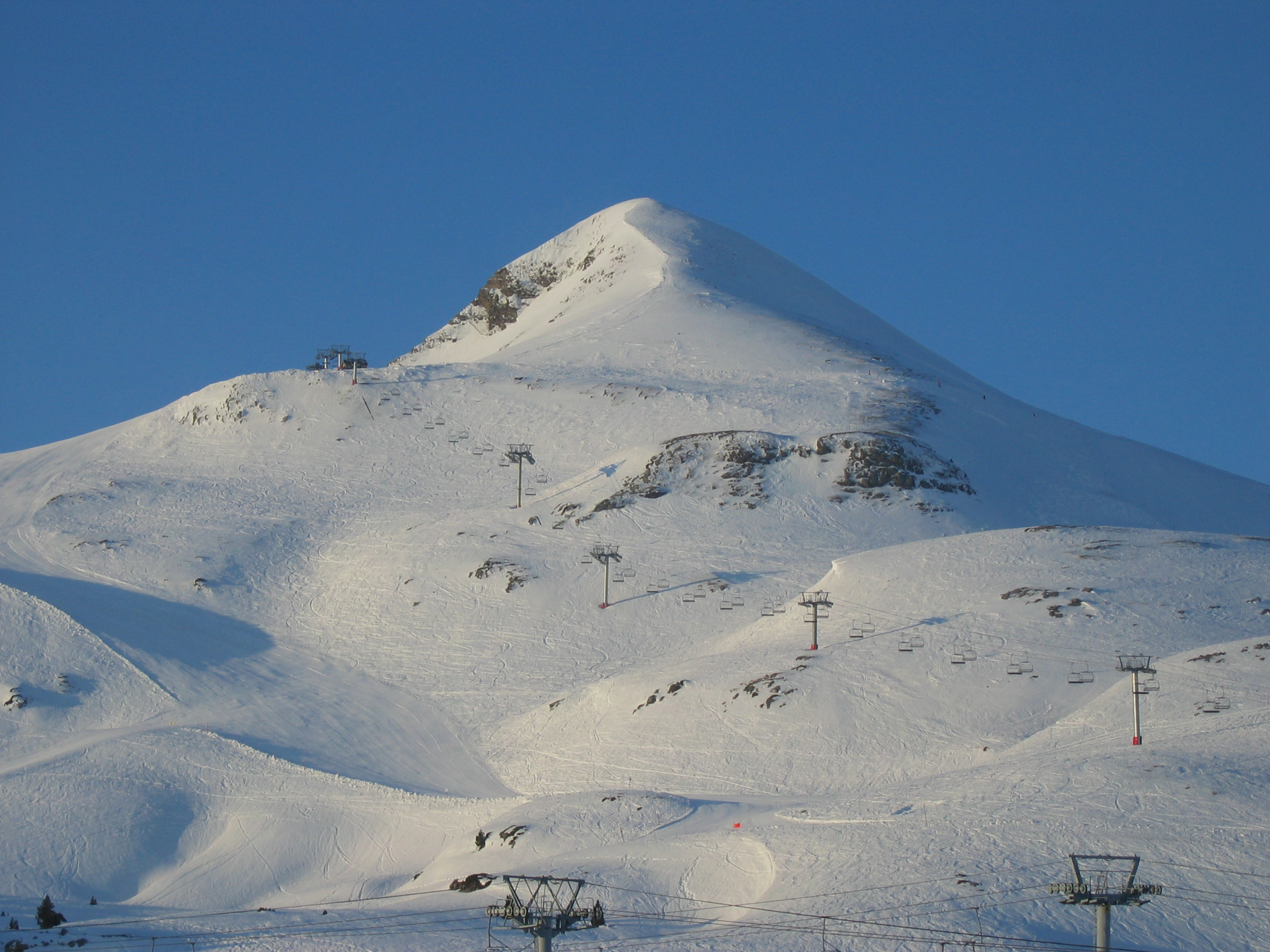 Vue de l'Arlas, station de La Pierre Saint Martin, photo personnelle